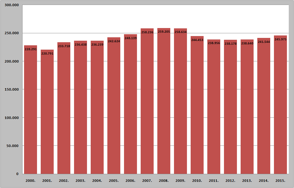 Српски (ћирилица): Број запослених у Републици Српској (2000 - 2015)